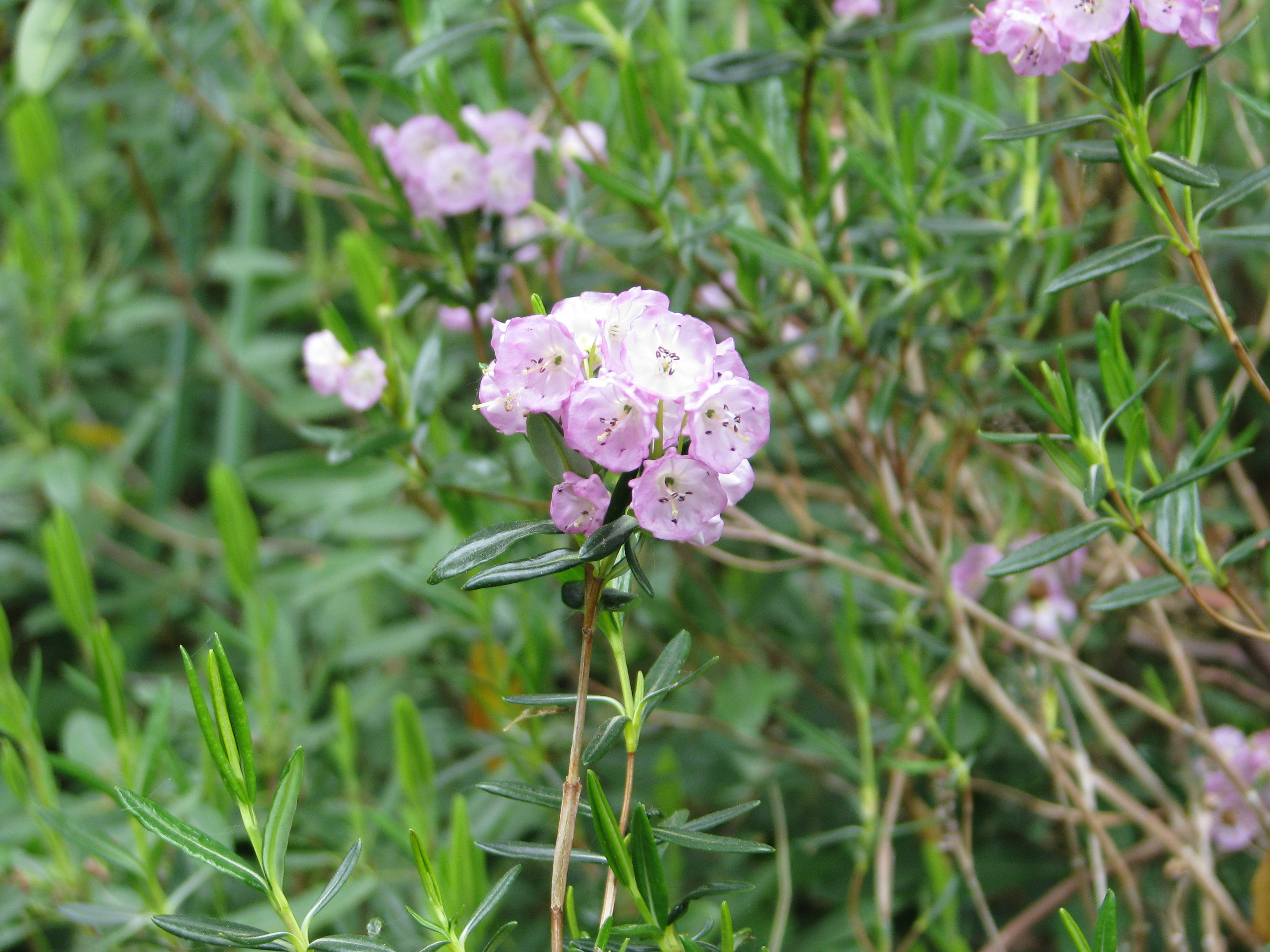 Kalmia poliifolia